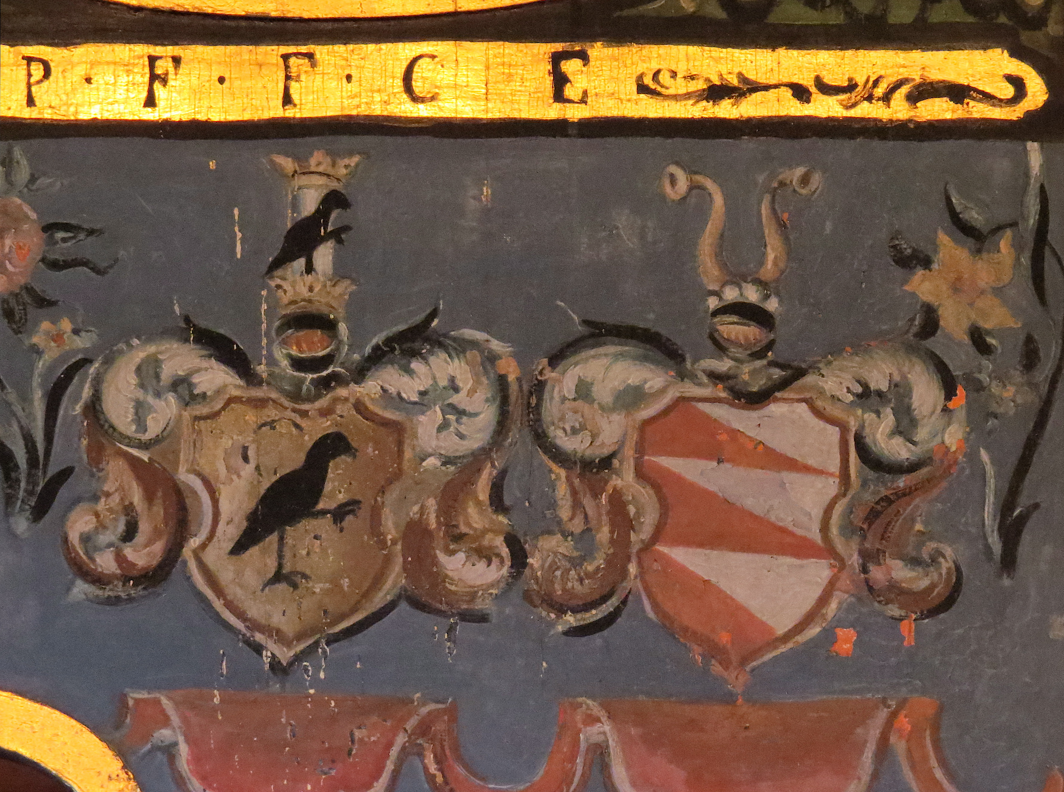 Våben tilhørende Alexander Rabe von Papenheim og Grubbe, Mælum Kirkes altertavle, Mælum, Skien, Telemarken